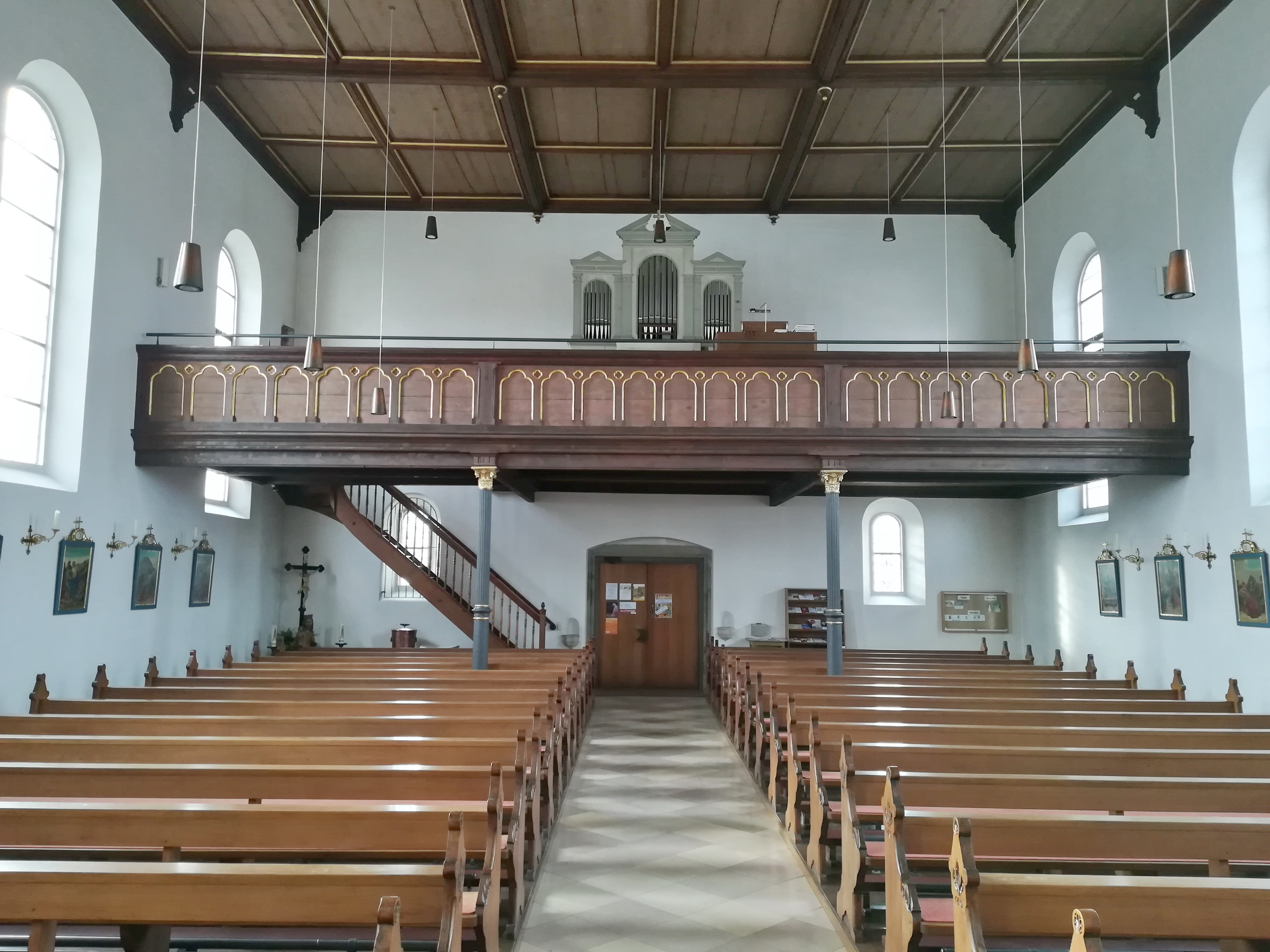 St. Petrus und Klemens ist eine denkmalgeschützte römisch-katholische Pfarrkirche in der Kirchbergstraße 14 im Ortsteil Moosham der Gemeinde Mintraching.